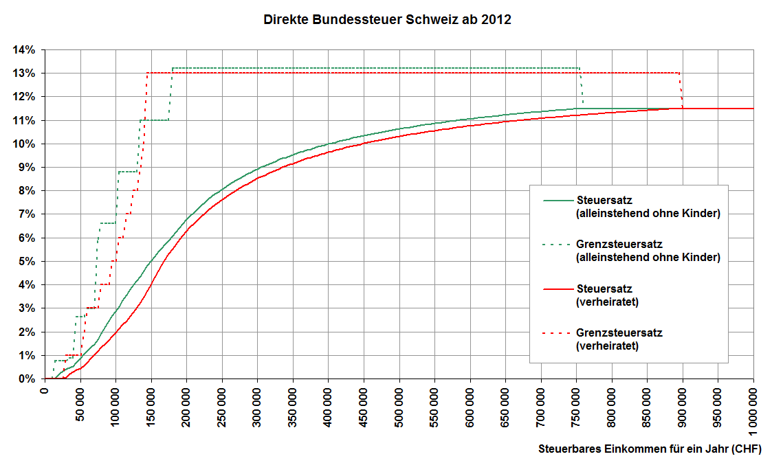 Direkte Bundessteuer in der Schweiz ab 2012. Die Grafik zeigt den Verlauf des Grenzsteuersatzes (gestrichelte Linien) und des Durchschnittsteuersatzes (durchgezogene Linien) in Abhängigkeit vom steuerbaren Einkommen bis zu 1 000 000 CHF.